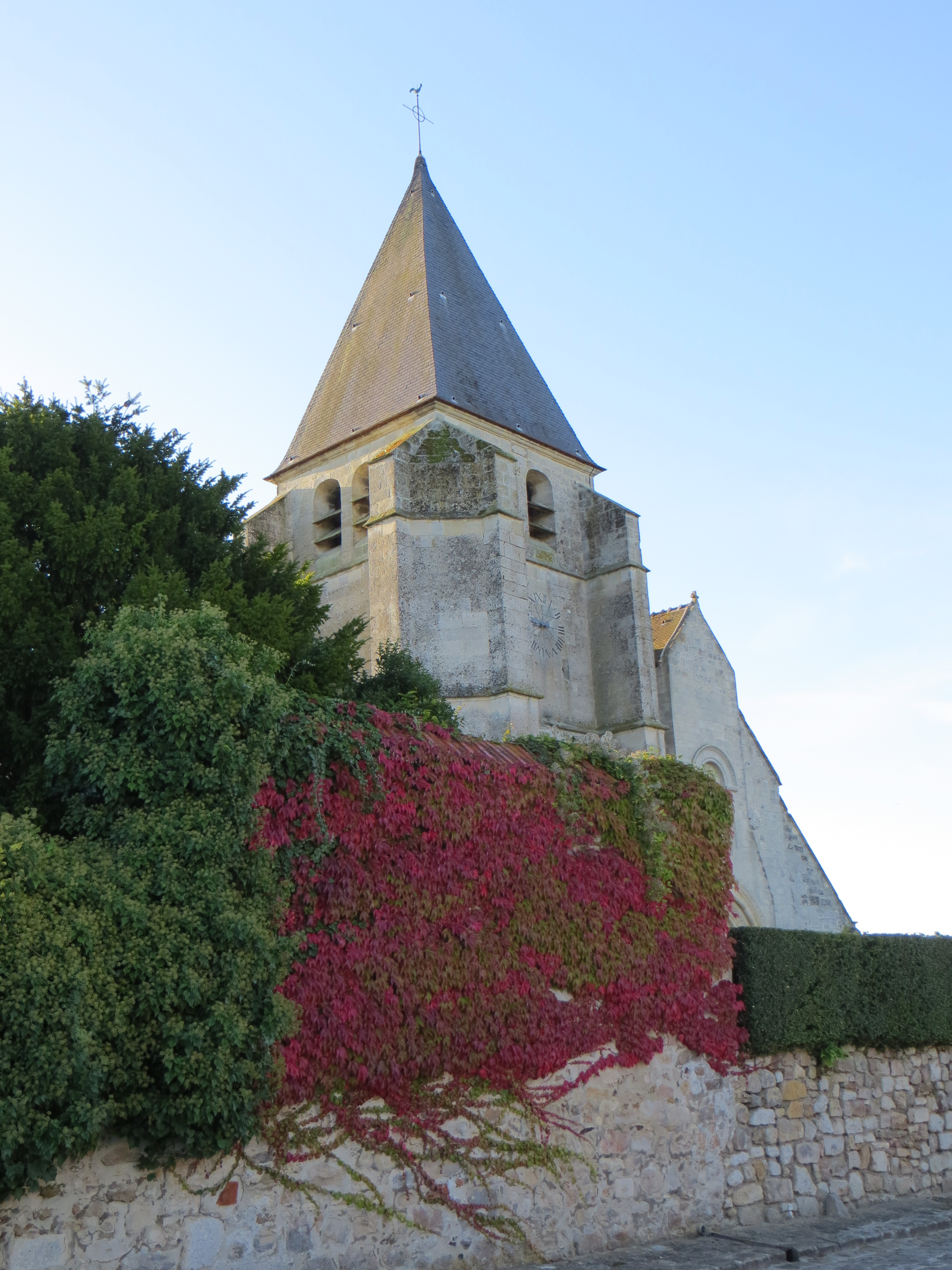 Vue générale .